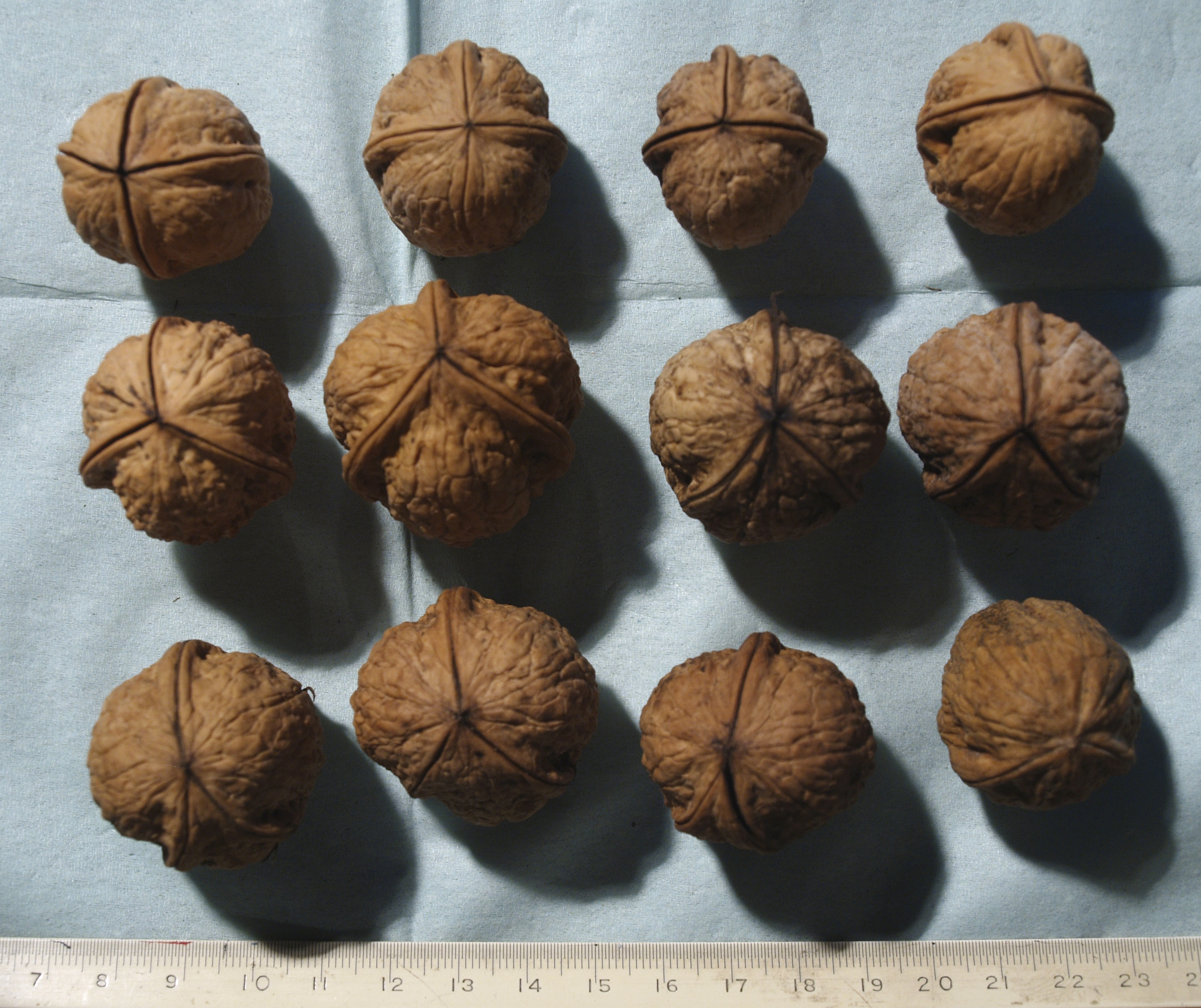 Variabilität von Früchten eines Walnuss-Baumes